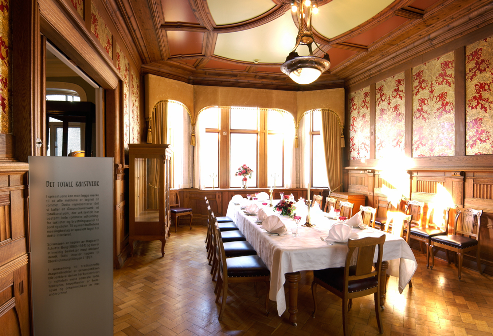 Apoteker Øwres spisestue fra 1907 på Jugendstilsenteret